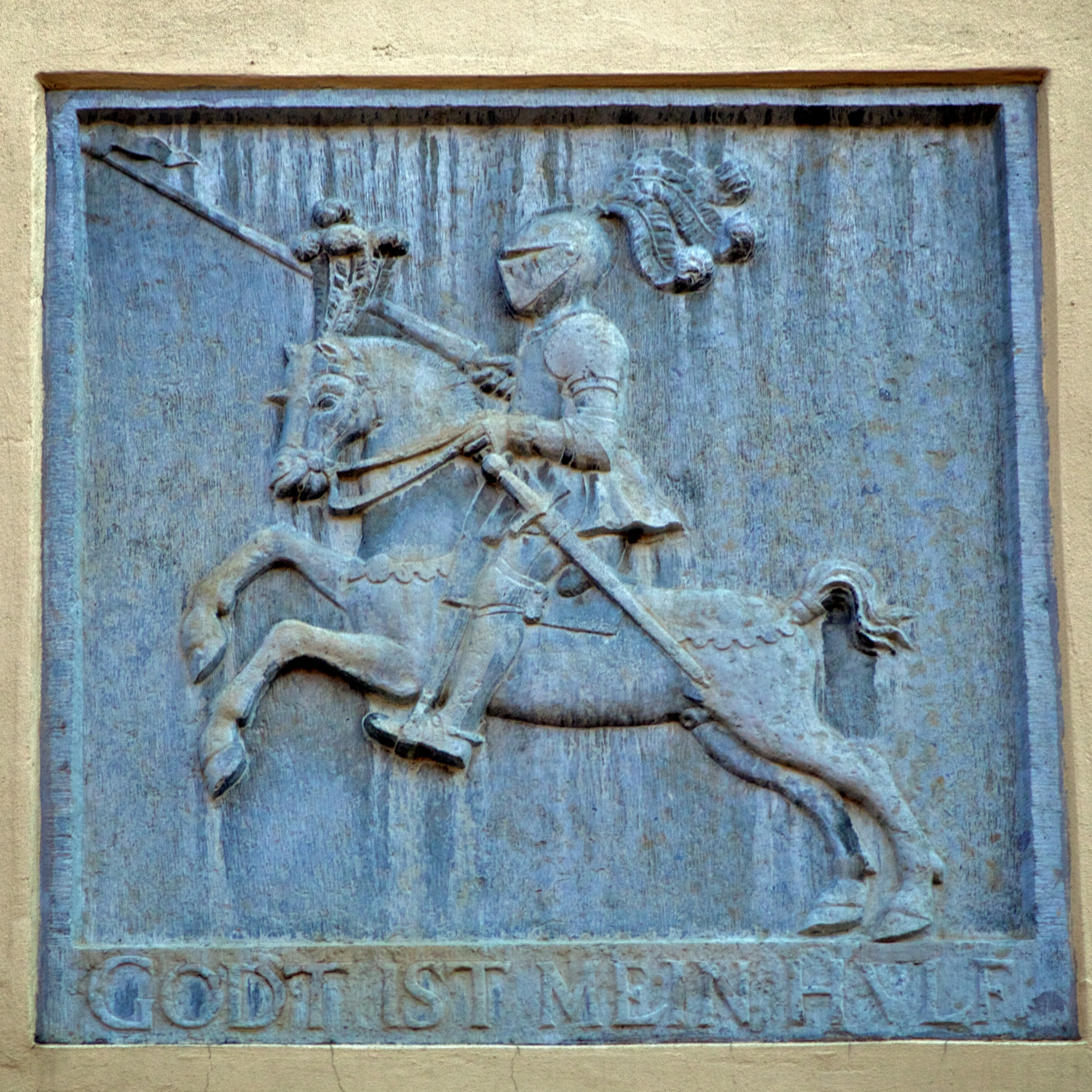 Tallinn Up Close